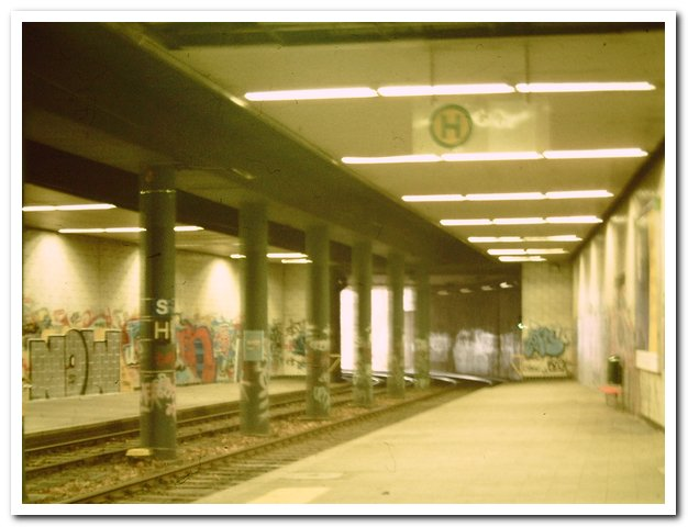 Die frühere unterirdische Straßenbahnhaltestelle vor dem Kasseler Bahnhof im Jahr 2000